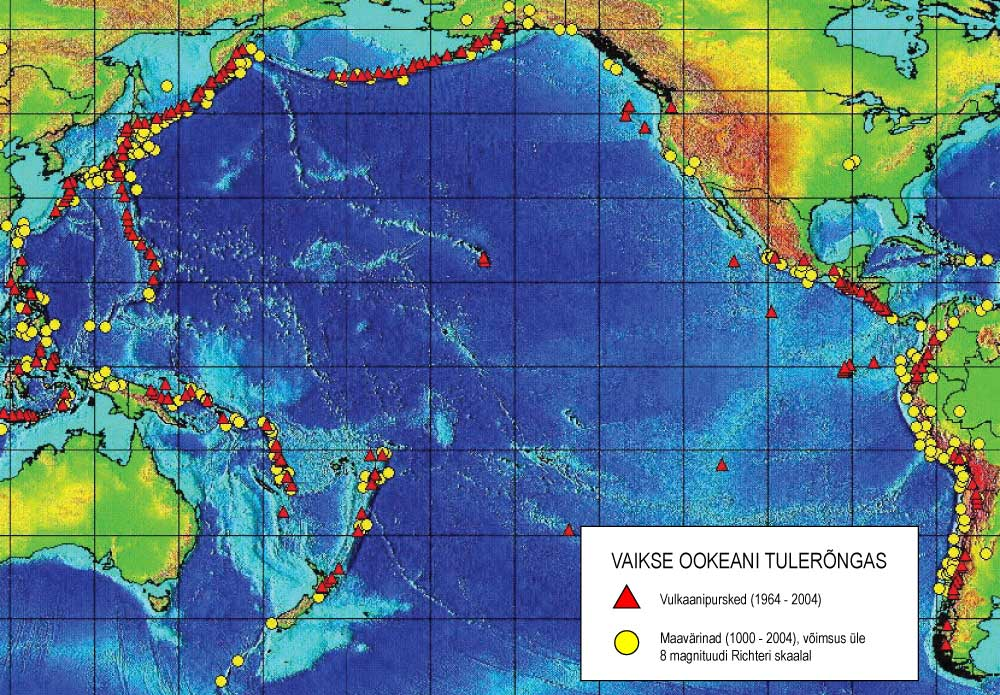 Vaikse ookeani tulerõngas